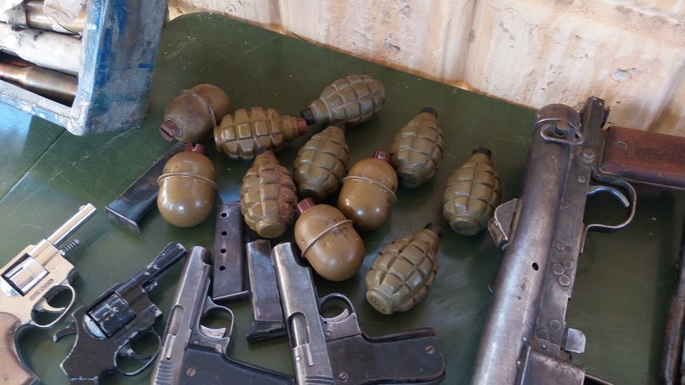 En images : découverte d'un lot d'armes dans la ville de Tombouctou au Mali 08 septembre 2016 À Tombouctou, au Mali, les autorités ont fait part de la découverte d’un important lot d’armes de guerre et de munitions. Cette découverte a été rendu possible grâce au concours de la population locale qui a informé la gendarmerie de la ville, d’un mouvement suspect au niveau d’un bâtiment inhabité. Après une semaine d’enquête, les gendarmes ont trouvé un véritable arsenal de guerre.